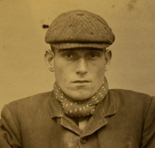 Photo d'identité judiciaire d'un prétendu Peaky Blinder - Stephen McNickle